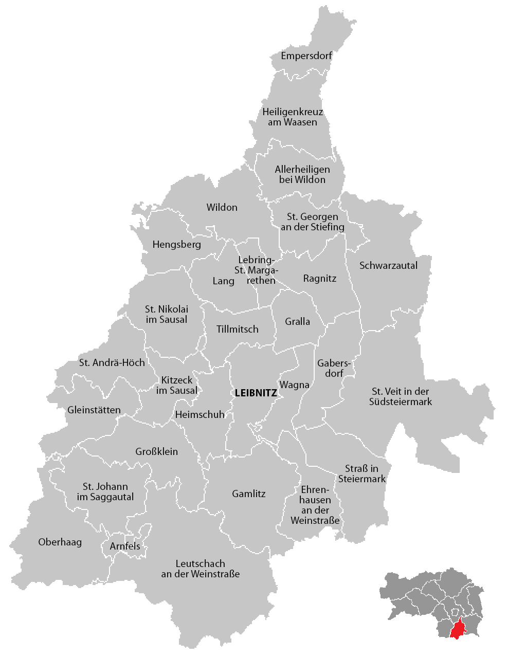 Gemeinden im Bezirk Leibnitz (Steiermark), Stand: 1. Januar 2015